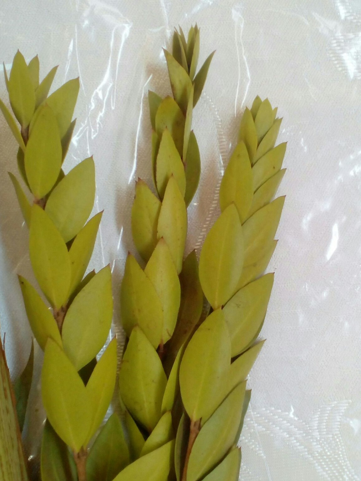 שלושה הדסים.